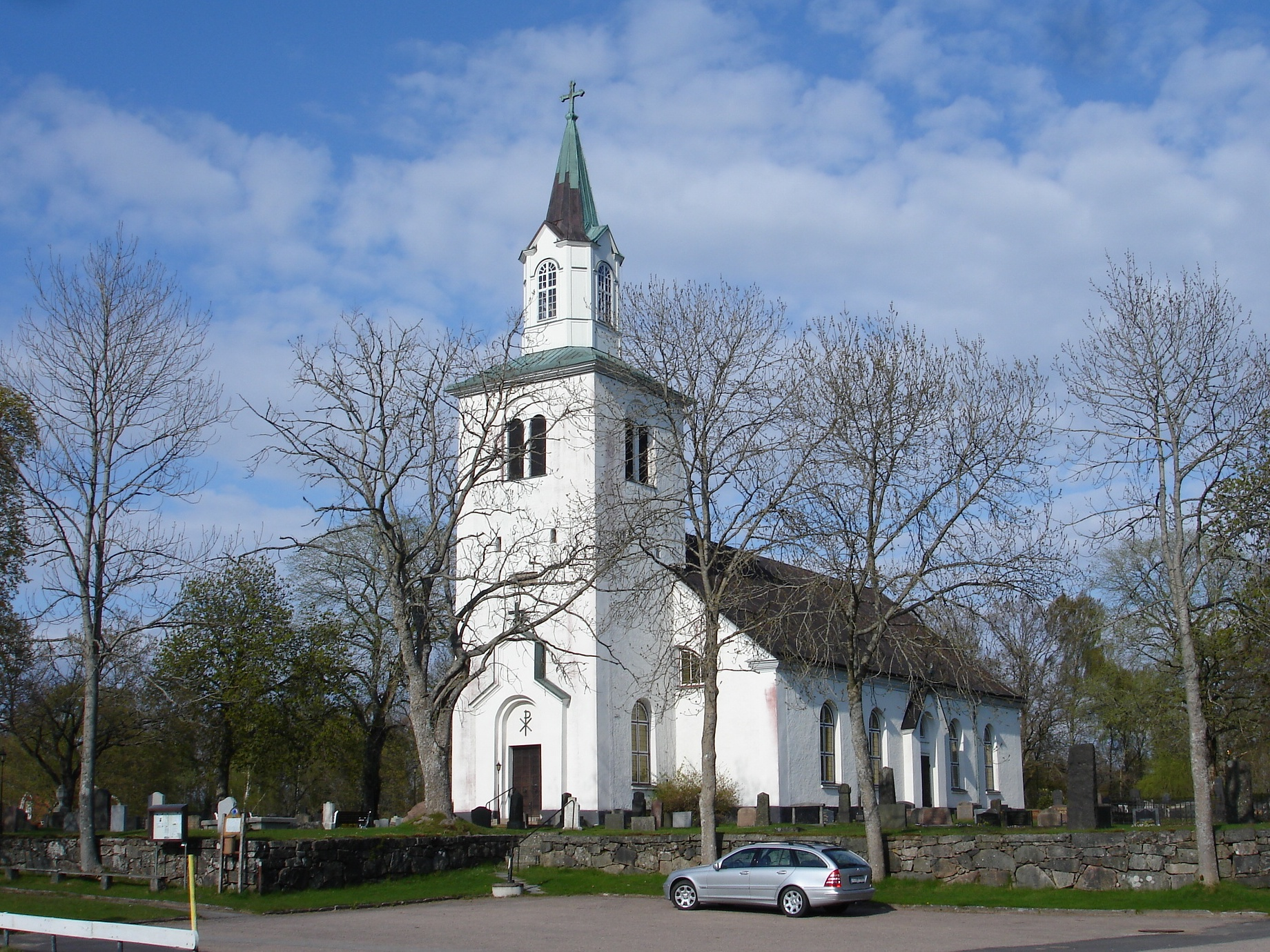 Kyrkan från sydväst